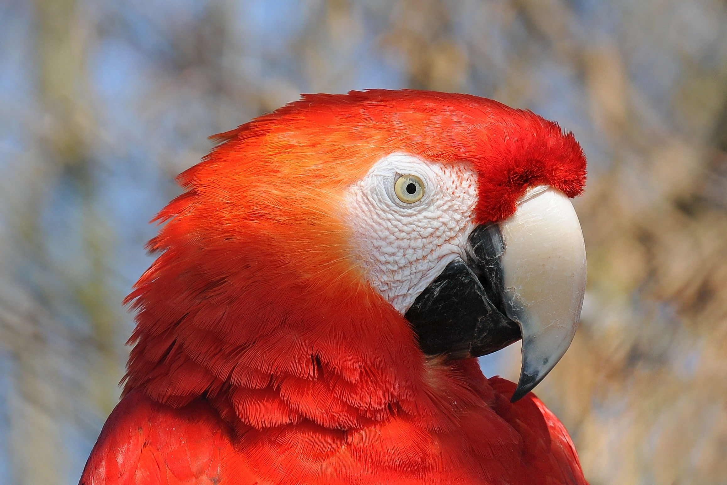 Ara macao